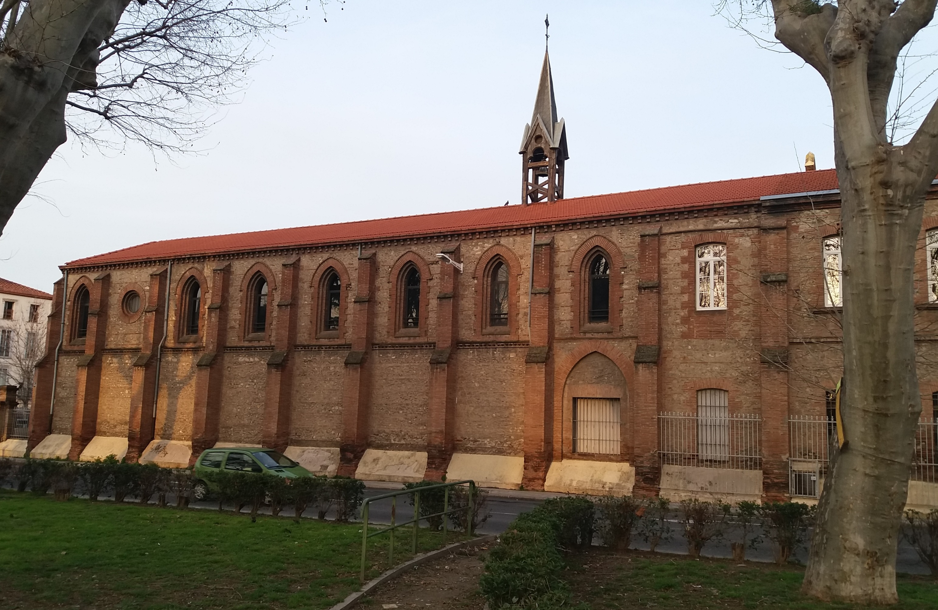 L'església de la Mare de Déu del Bon Socors de Perpinyà